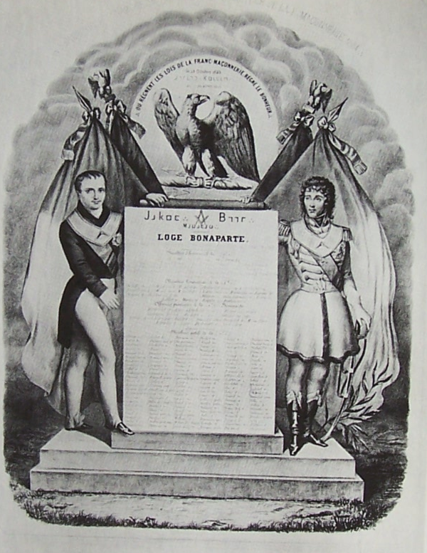 Tableau de la Loge maçonnique "Bonaparte", c. 1810